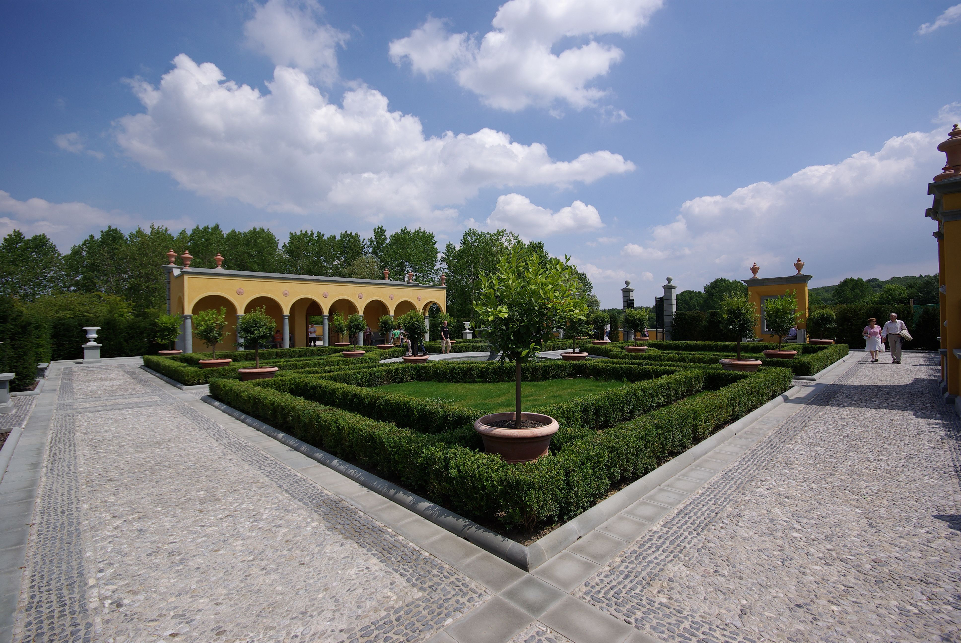 Der italienische Garten oder auch Renaissance Garten, das Bild zeigt das Innere